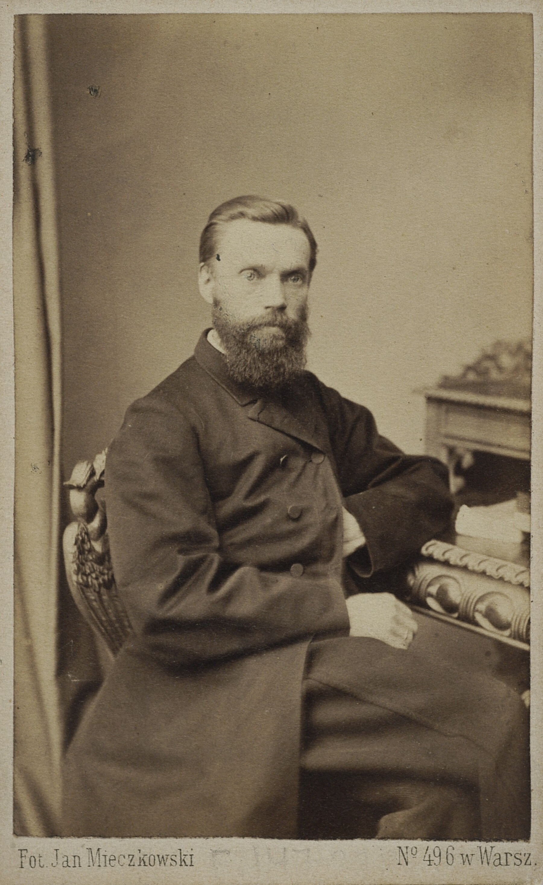 Adolf Hennel